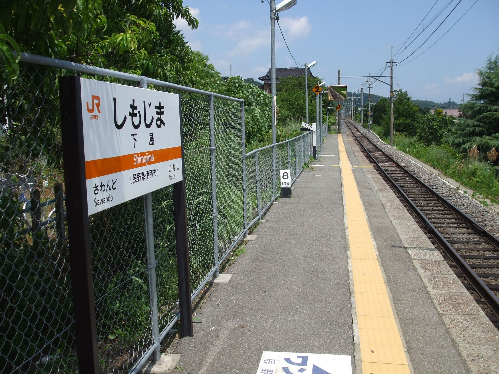 下島駅(長野県伊那市) ホームより伊那市駅方面を望む